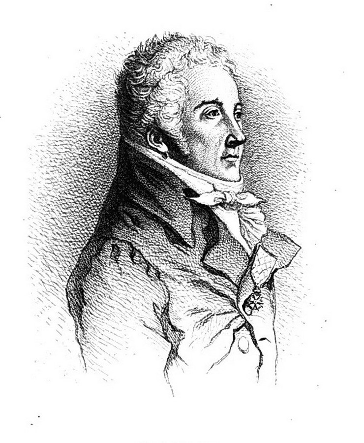 Portrait exécuté à partir d'un physionotrace.